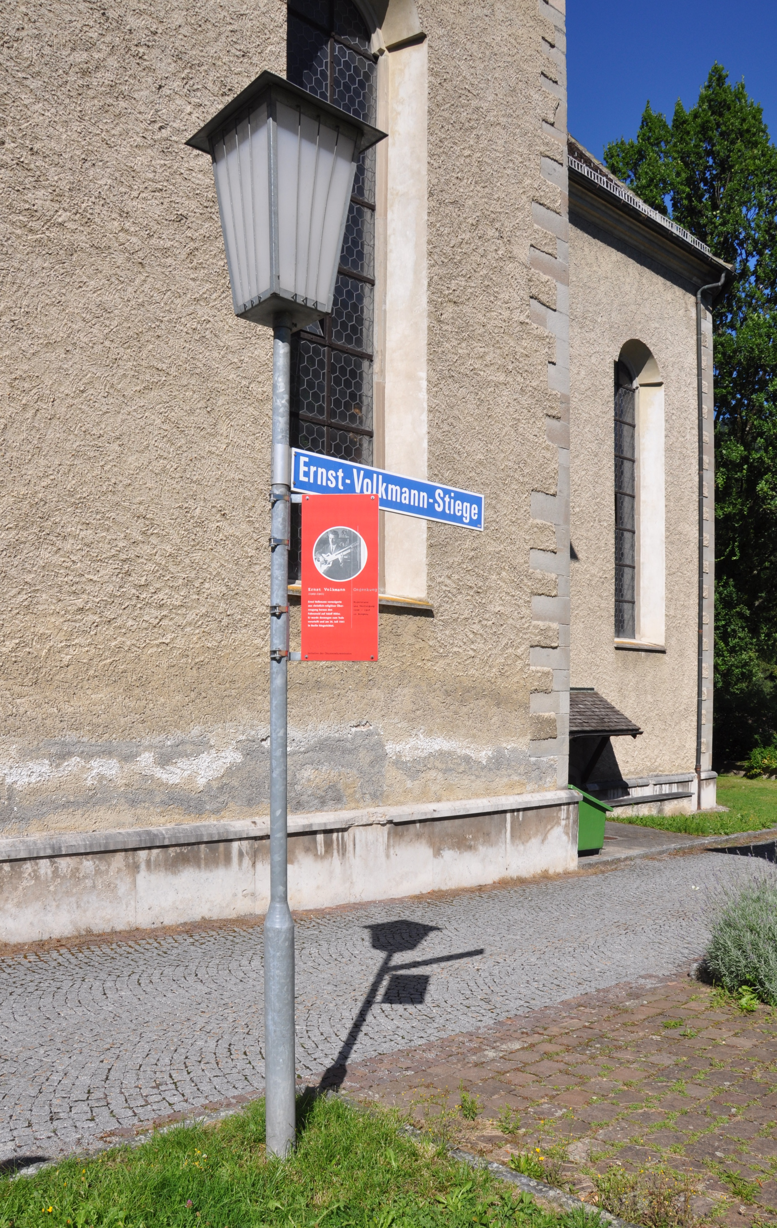 Bregenz, Ernst-Volkmann-Stiege bei der Pfarrkirche St. Gallus, Straßenschild und Informationstafel